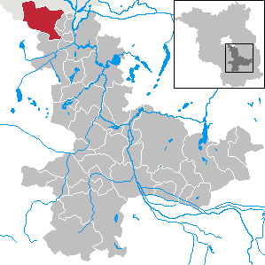 Schönefeld in Brandenburg (Country) - District Dahme-Spreewald